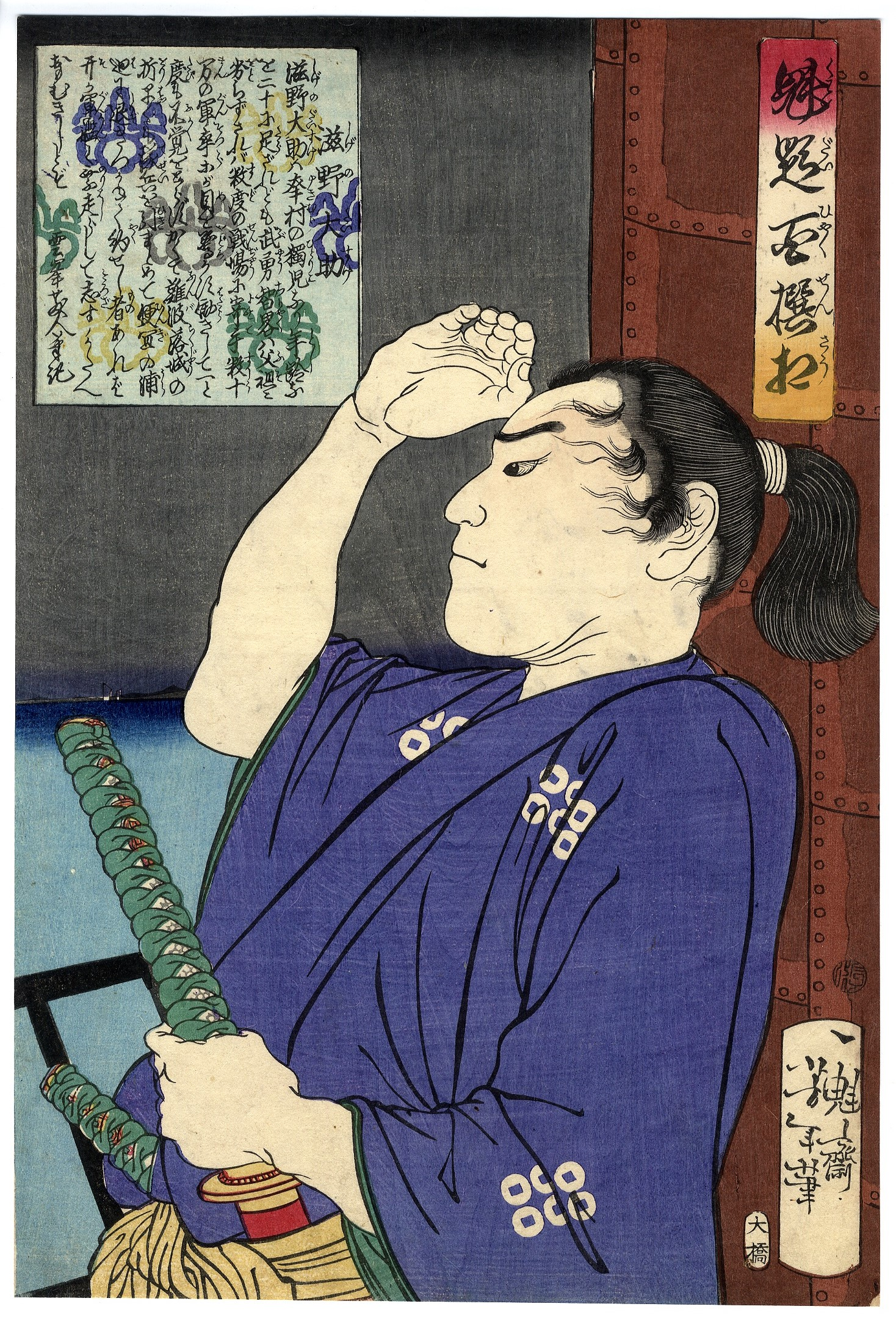 真田幸昌像